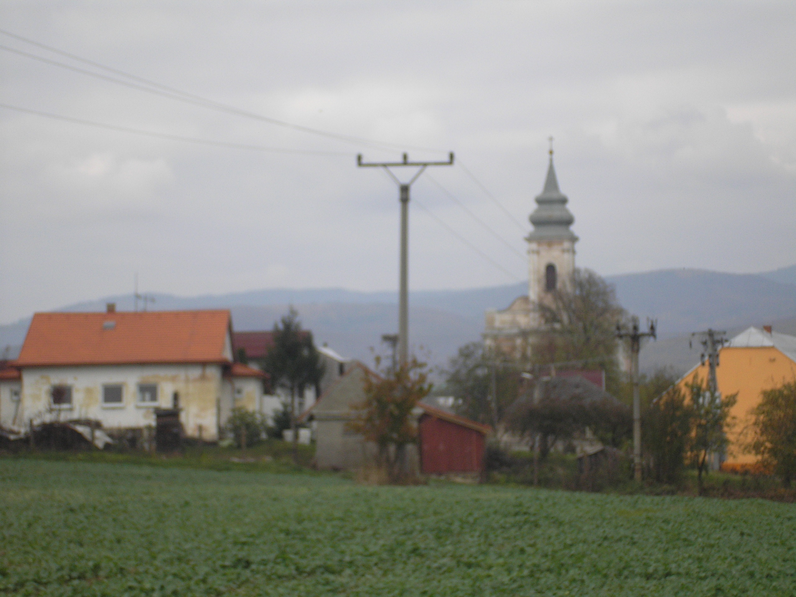 Pohlad na obec Rudnik (Kosice-okolie)